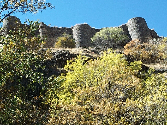 ԱՄՐՈՑ «ԿԱՔԱՎԱԲԵՐԴ» («ԹԱԹՈՒԼԻ ԲԵՐԴ») 98.6/1